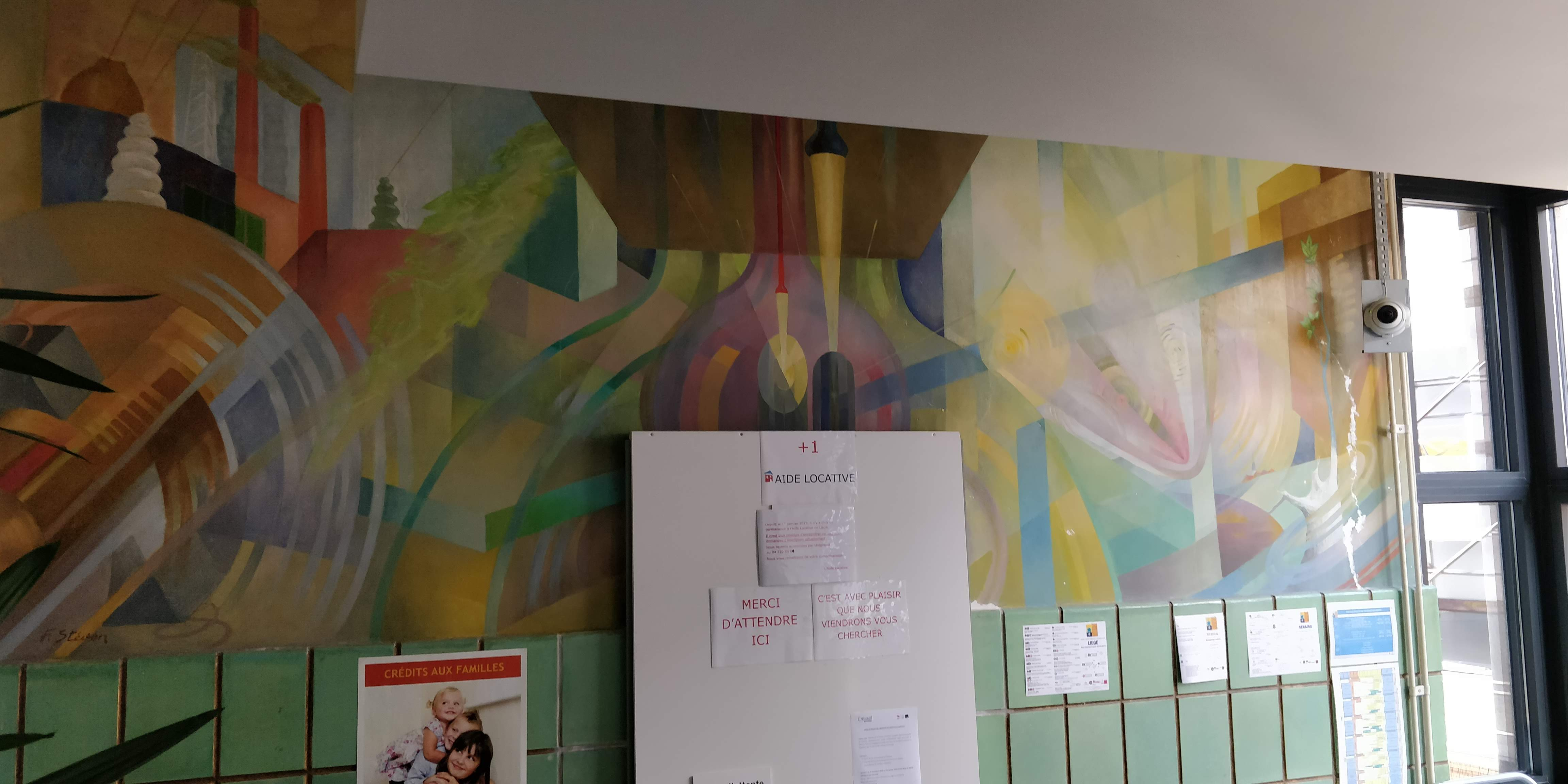 FresqueSeeliger